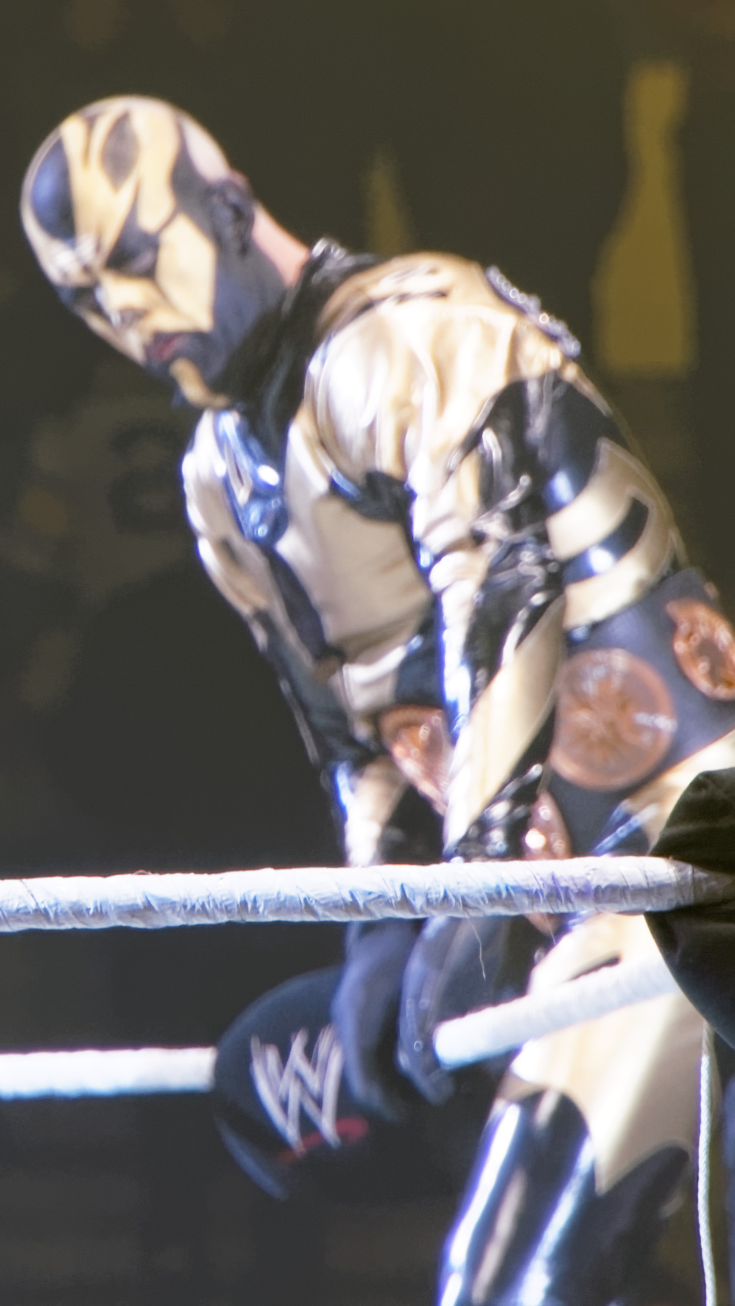 goldust